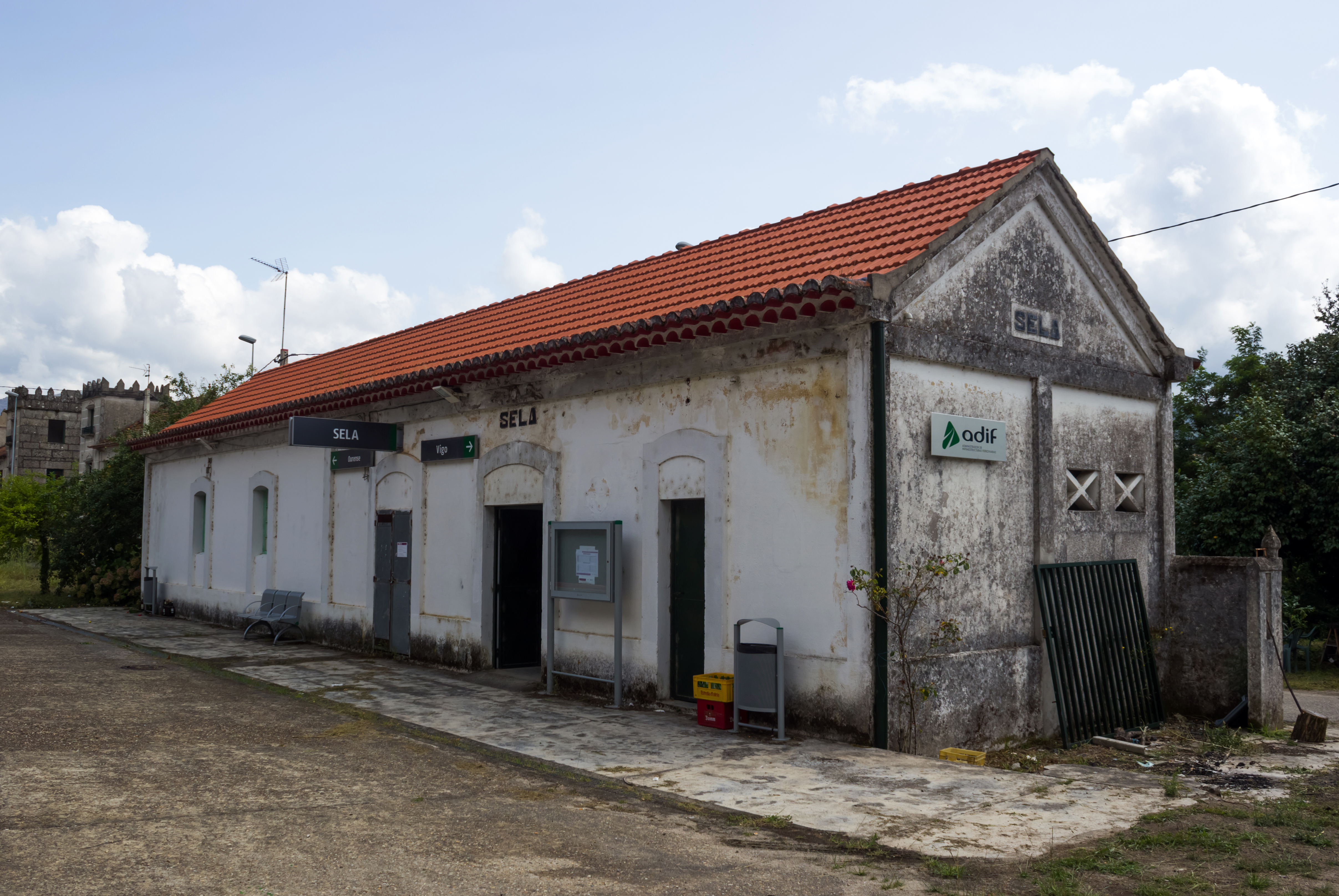 Estación de tren de Sela, no concello de Arbo.